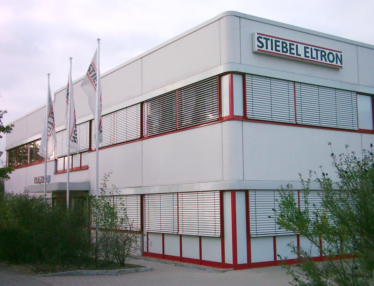 Niederlassung von Stiebel Eltron in Hamburg-Hausbruch.